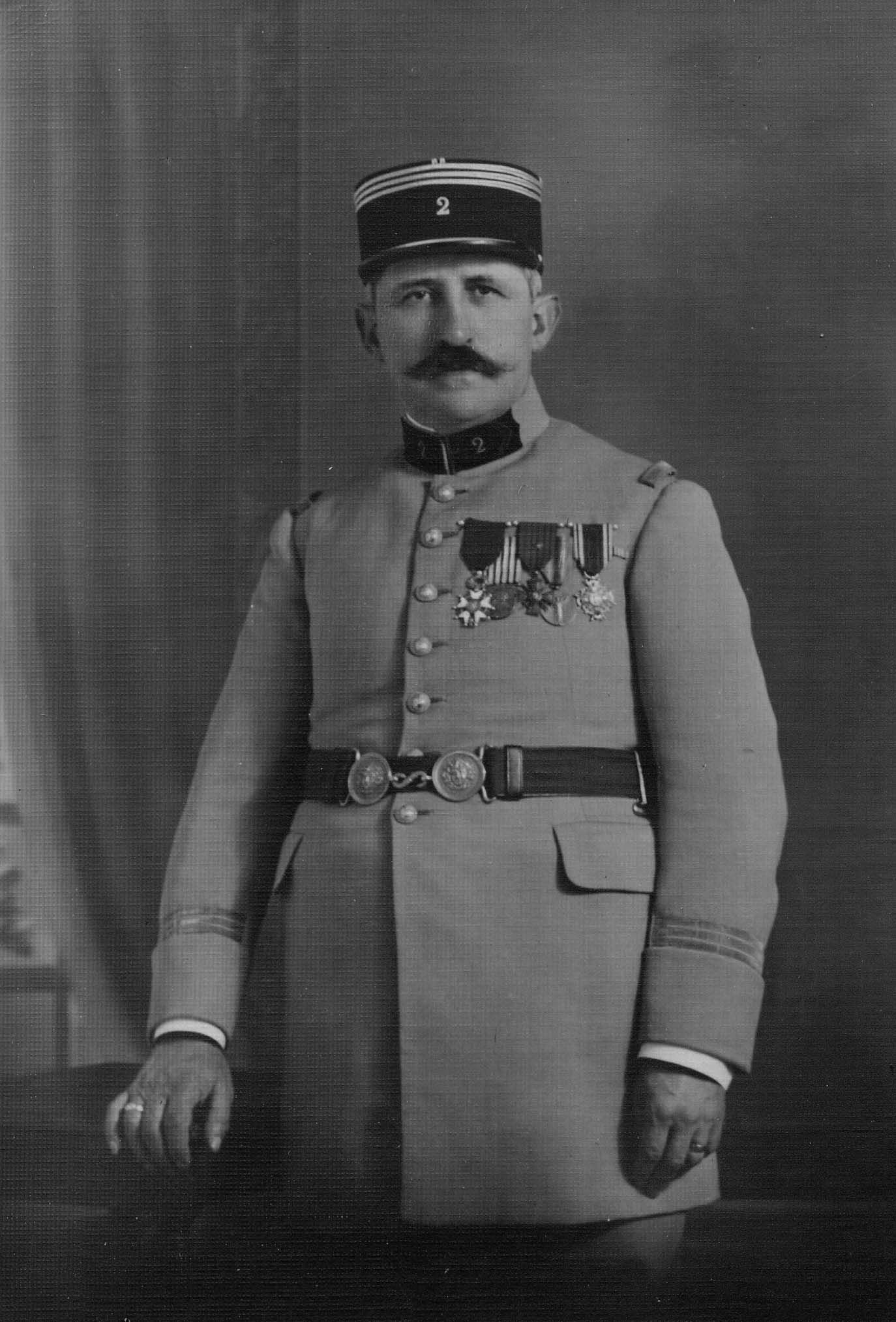 capitaine François-Joseph Fulcrand (1875-1959), pionnier de la télégraphie sans fil.